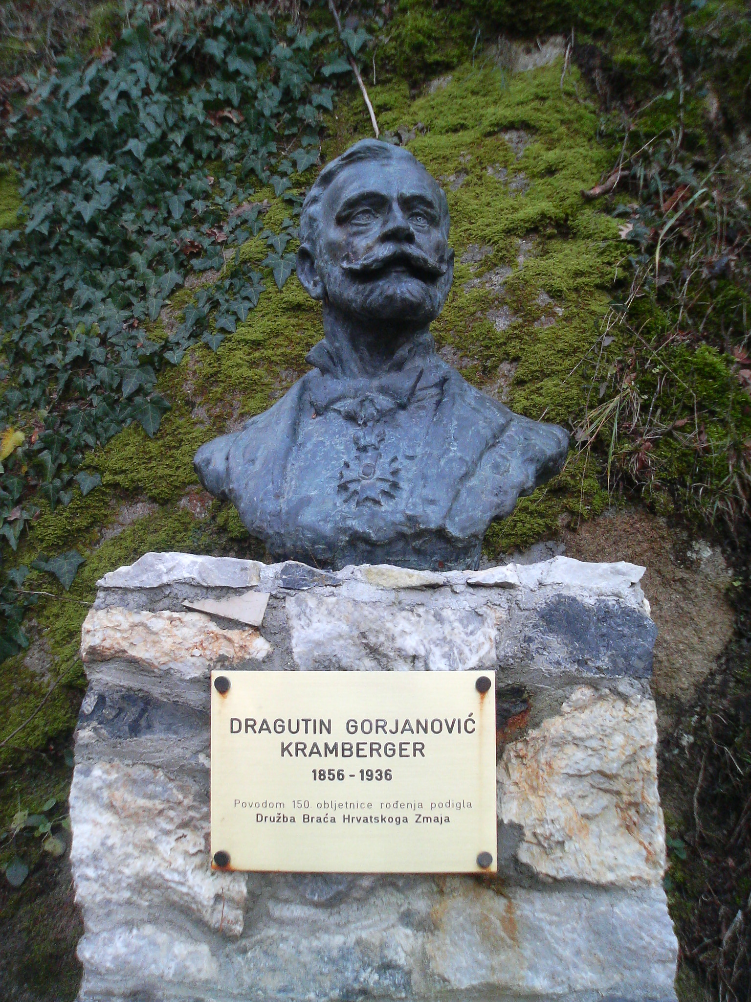 Dragutin Gorjanović Kramberger, bista u Krapini